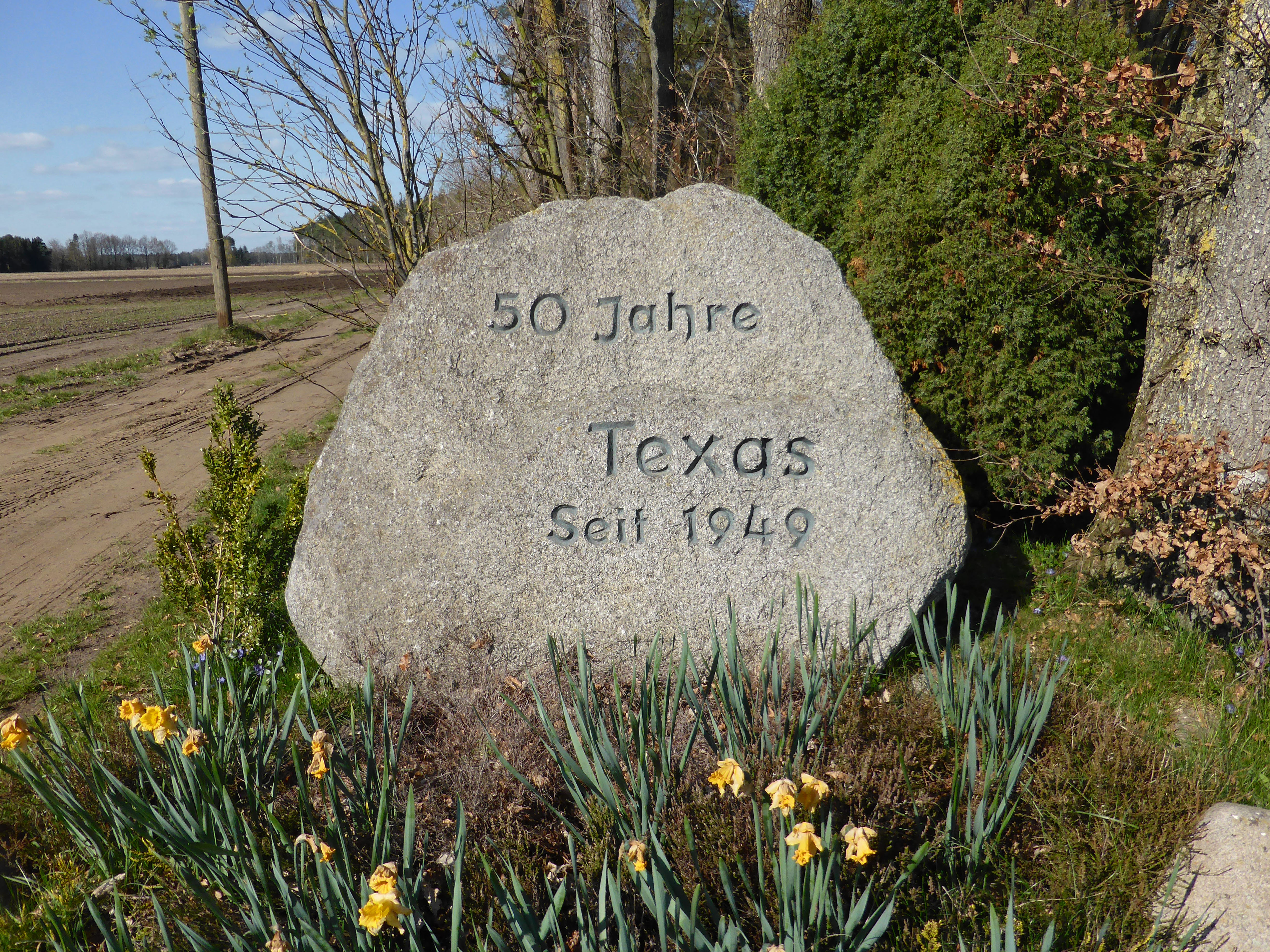 Gedenkstein an die Ortsgründung von Texas.